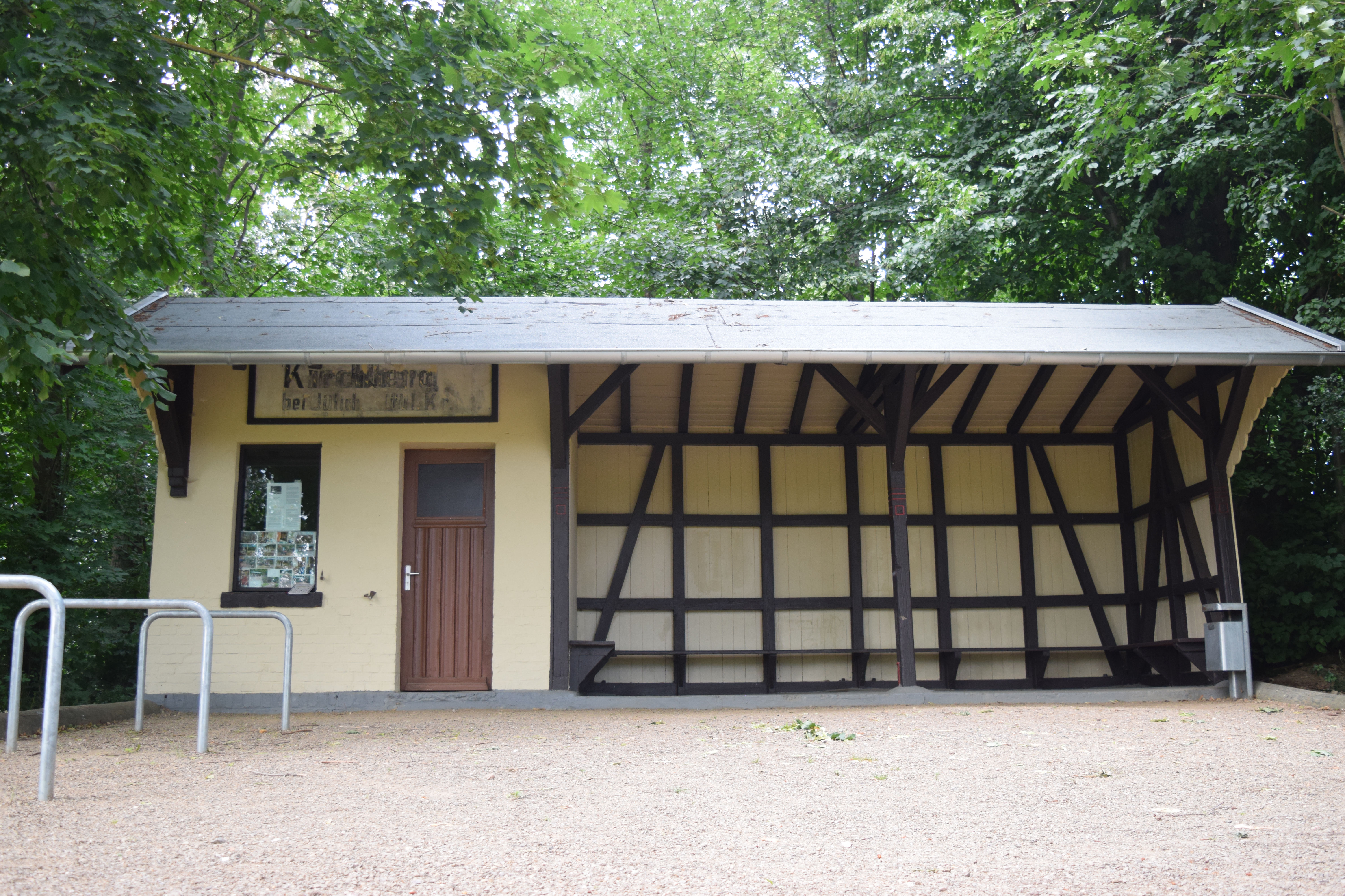 Durch die Dorfgemeinschaft Zukunft Kirchberg e.V. in 2019 renoviertes Wartehäuschen der Jülicher Kreisbahn am Ortseingang von Jülich-Kirchberg. Das Häuschen wird nun als Rastplatz am Radschnellweg Jülich-Aachen genutzt. Der Haltestellenname wurde bei der Renovierung freigelegt.